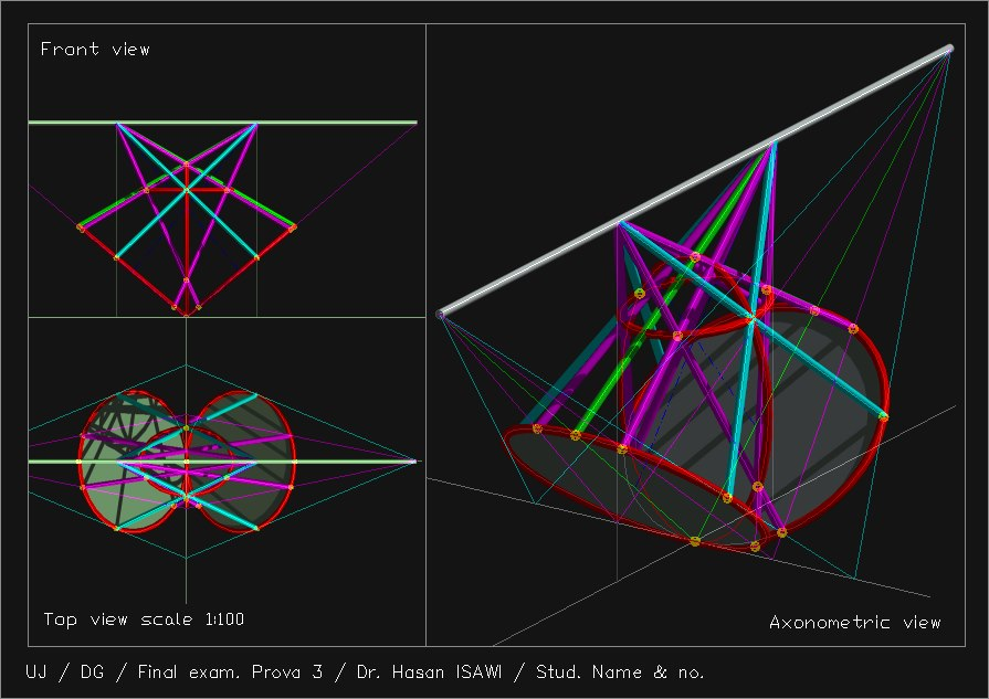 تسخدم حزمة المستويات مثلا لتسهيل عملية تحديد التقاطع بين الحجوم التي لها رأس نهائي مثل المخروط أو الهرم، او لانهائي، مثل الاسطوانة والمنشور. وتسمى تلك الحزمة مستويات مساعدة. التي تشترك بالخط الذي يمر برؤوس الحجوم المعنية، ولذلك يمكن تقسيم الحالات الى ثلاث، وهي: - في حالة التقاطع بين حجوم برؤوس نهائية (مخروط، هرم)، فالمستويات المساعدة تمر بخط نهائي . الذي يمر بدوره بنقطتين نهائتين (روؤس الحجوم). وهذا يعني ان المستويات المساعدة تشترك بخط نهائي وبالتالي ليست متوازية لبعضها البعض. - في حالة التقاطع بين حجمين واحد برأس نهائي (مخروط، او هرم) والاخر برأس لانهائي (اسطوانة، او منشور) ، فالمستويات المساعدة تمر بخط نهائي . الذي يمر بنقطة نهائية (رأس المخروط) وموازي لاتجاه النقطة اللانهائية (رأس الاسطوانة) . وهذا يعني ان المستويات المساعدة تشترك بخط نهائي وبالتالي ليست متوازية لبعضها البعض. أما في حالة التقاطع بين حجمين برؤوس لانهائية (اسطوانتين او منشورين) ، فالمستويات المساعدة تمر بخط لانهائي . الذي يتم تحديده كاستلقاء لمستوى موازي لاتجاهات محوري الاسطوانتين (او المنشورين) . وفي هذه الحالة المستويات المساعدة تشترك بخط لانهائي وبالتالي تكون متوازية لبعضها البعض. الدكتور حسن العيسوي